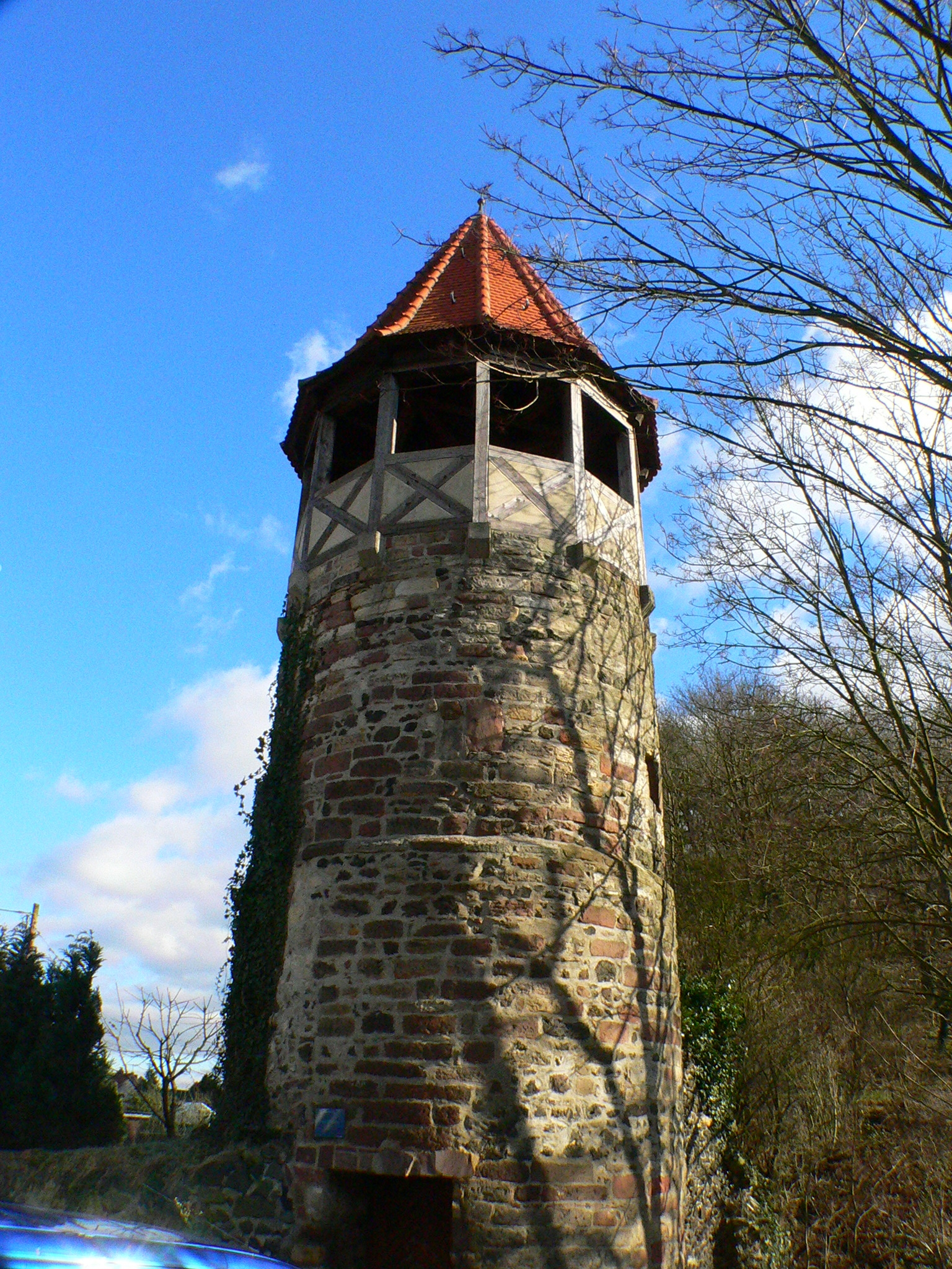 Gudensberg (Hessen), der "Gefangenenturm" an der Schlossstraße, einzig verbliebener Turm der ehemaligen Stadtbefestigung